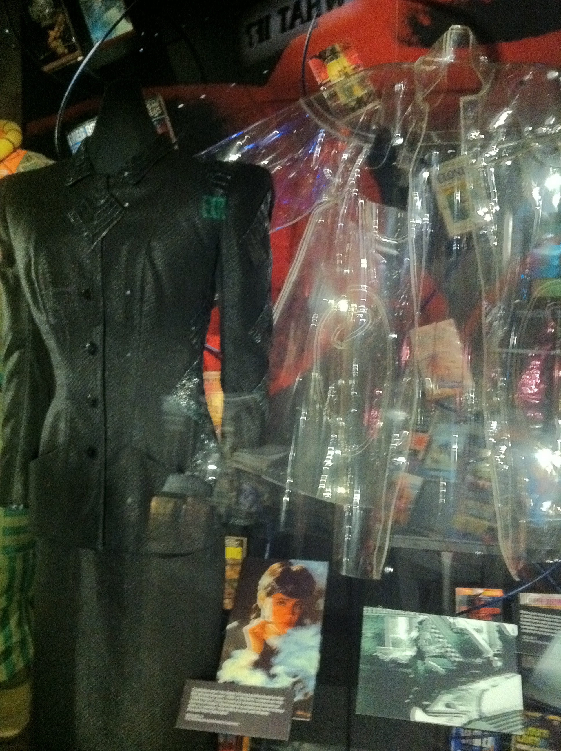 Costumes from Blade Runner at the Science Fiction Museum